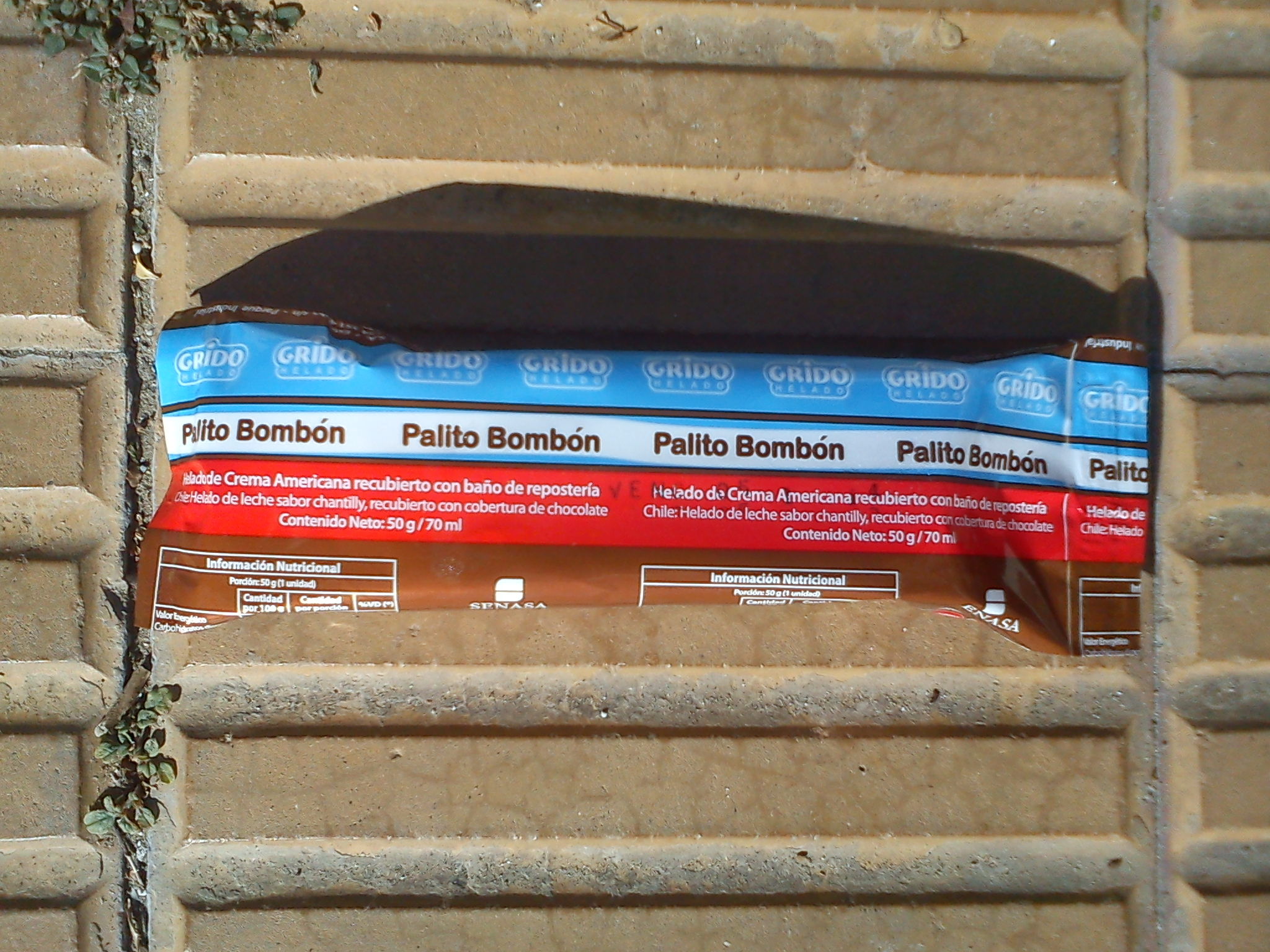 Palito Bombon